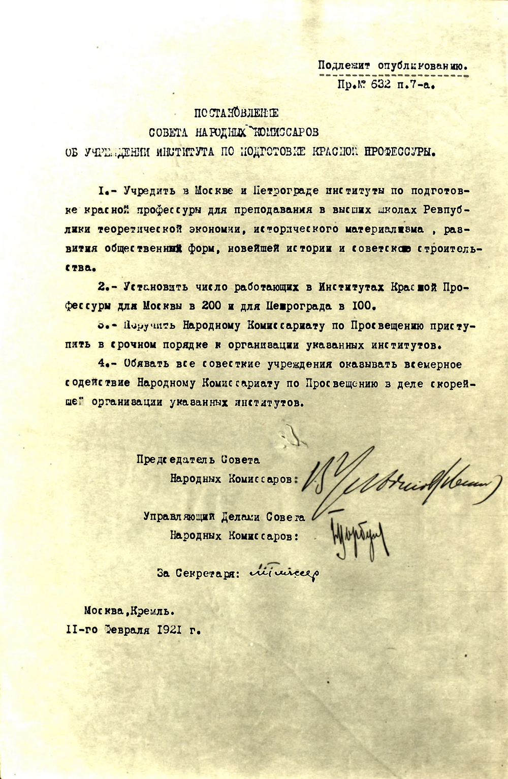 Октябрь 1921 – открыт Институт красной профессуры (ИКП). Институт был создан постановлением Совета народных комиссаров РСФСР для подготовки преподавателей общественных наук для вузов, а также работников для научно-исследовательских учреждений, центральных партийных и государственных органов.